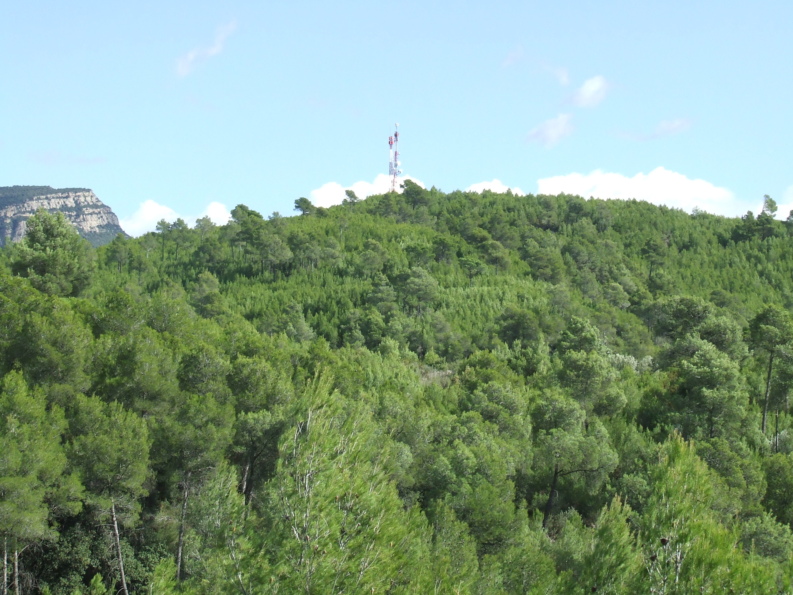 El Turó dels Tres Termes (Bigues i Riells, Vallès Oriental)